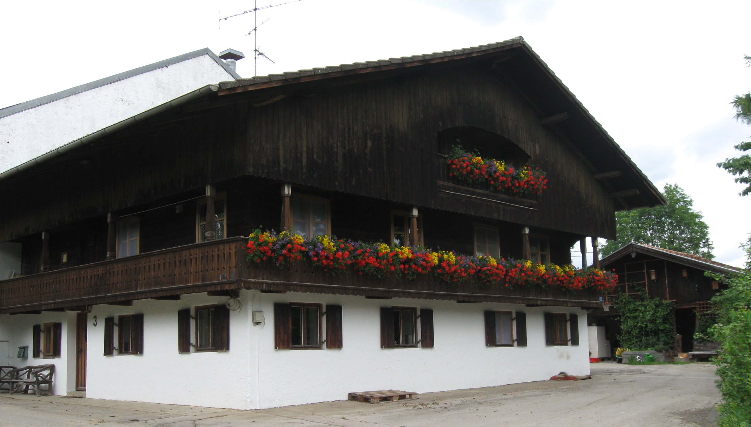 Ödenpullach: Haus Nr. 3; Bauernhaus (Beim Ertl), Wohnteil stattlich, mit Blockbau-Obergeschoss, Anfang 18. Jh.; Getreidekasten, Blockbau, 17./18. Jh. (verändert)